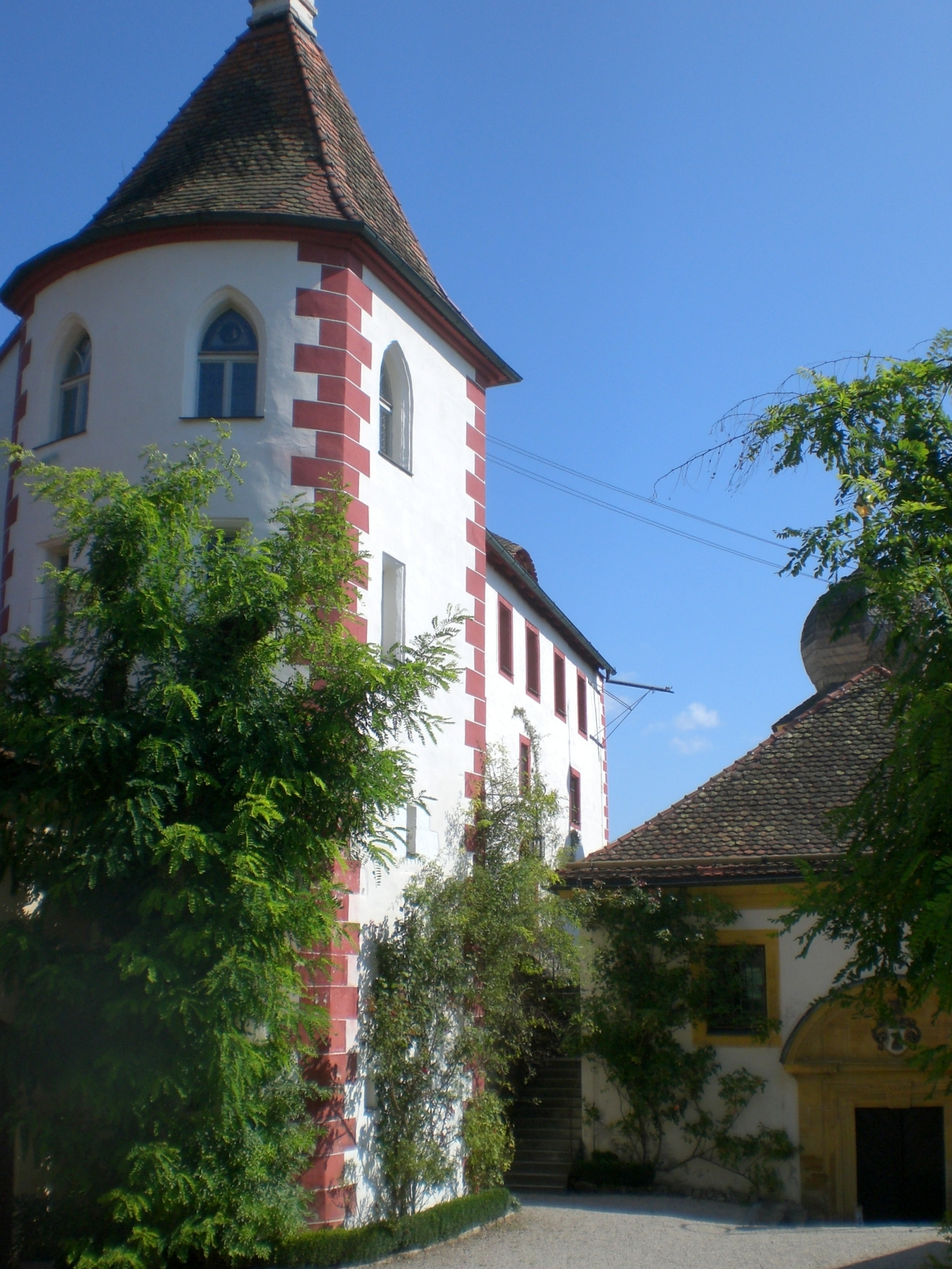 Burg Egloffstein